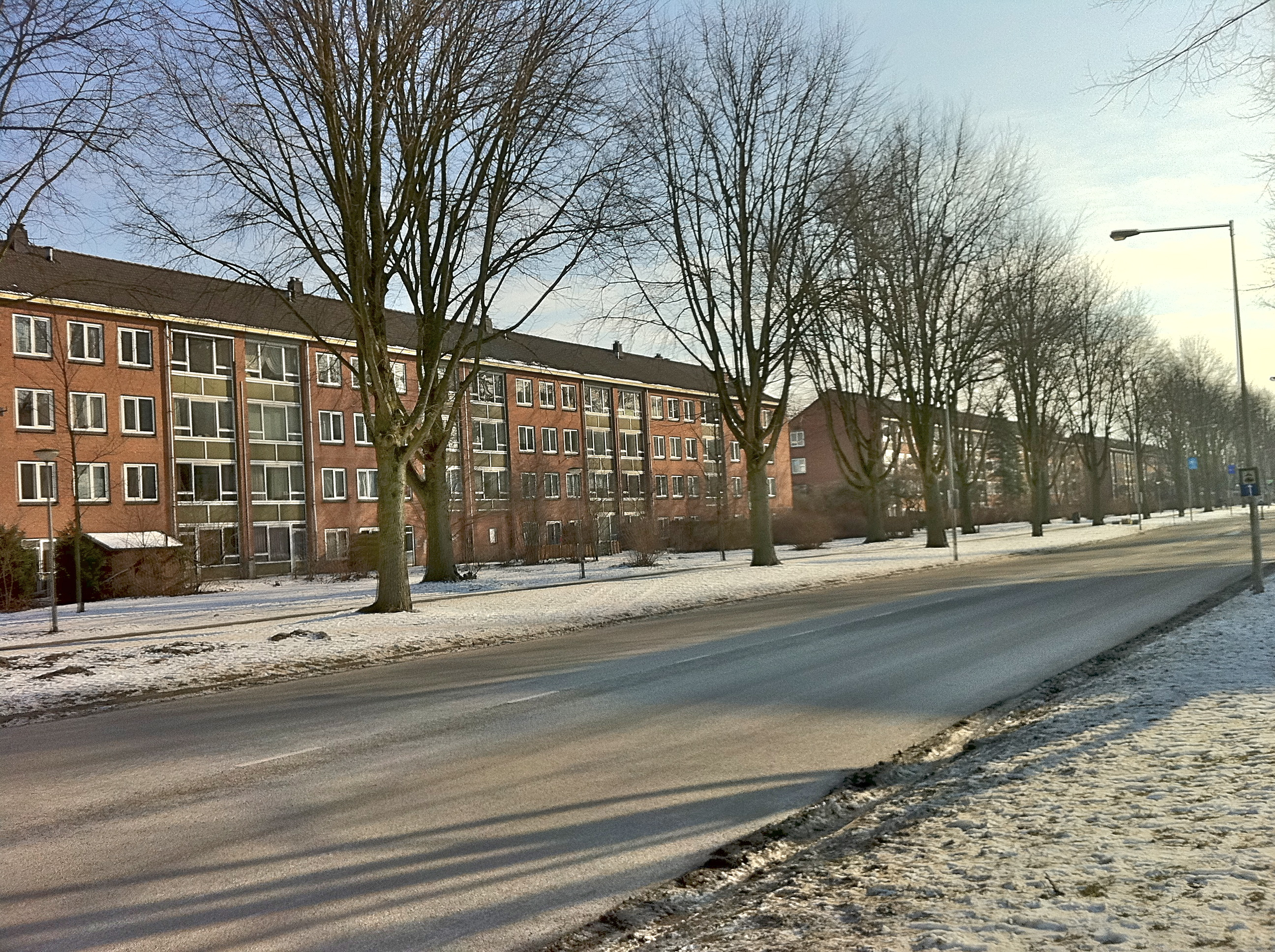 Amsterdam. IJdoornlaan. Sociale woningbouw van woningstichting Rochdale